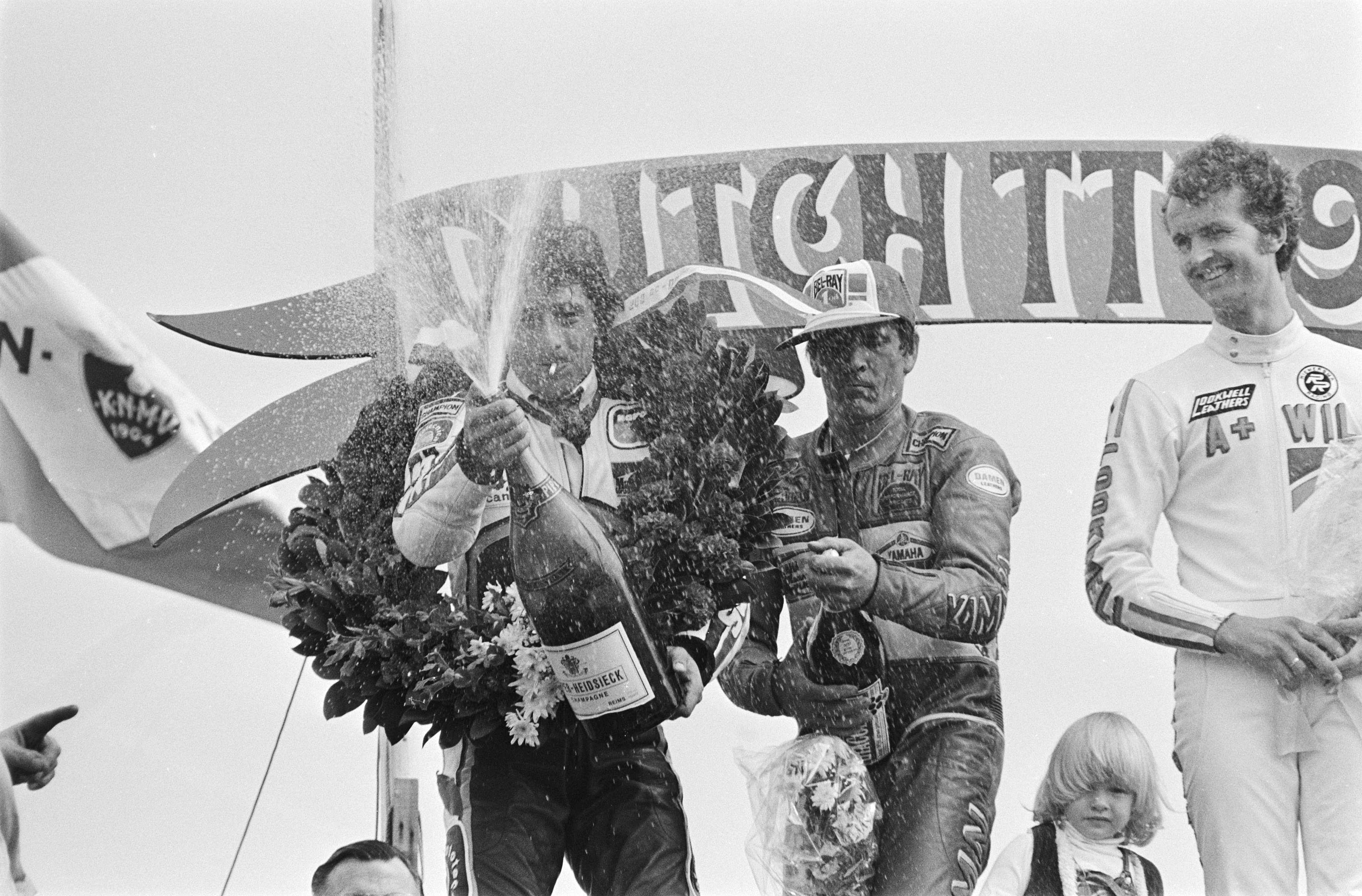 Collectie / Archief : Fotocollectie Anefo Reportage / Serie : TT Assen 1981 Beschrijving : TT Assen; Marco Lucchinelli (winnaar 500cc) spuitend me champagne, naast hem Boet van Dulmen (2e) en Wil Hartog Datum : 27 juni 1981 Locatie : Assen Trefwoorden : huldigingen, motorcoureurs, motorfietsen, motorsport Persoonsnaam : Dulmen, Boet van, Hartog, Wil, Lucchinelli, Marco Fotograaf : Dijk, Hans van / Anefo Auteursrechthebbende : Nationaal Archief Materiaalsoort : Negatief (zwart/wit) Nummer archiefinventaris : bekijk toegang 2.24.01.05 Bestanddeelnummer : 931-5669